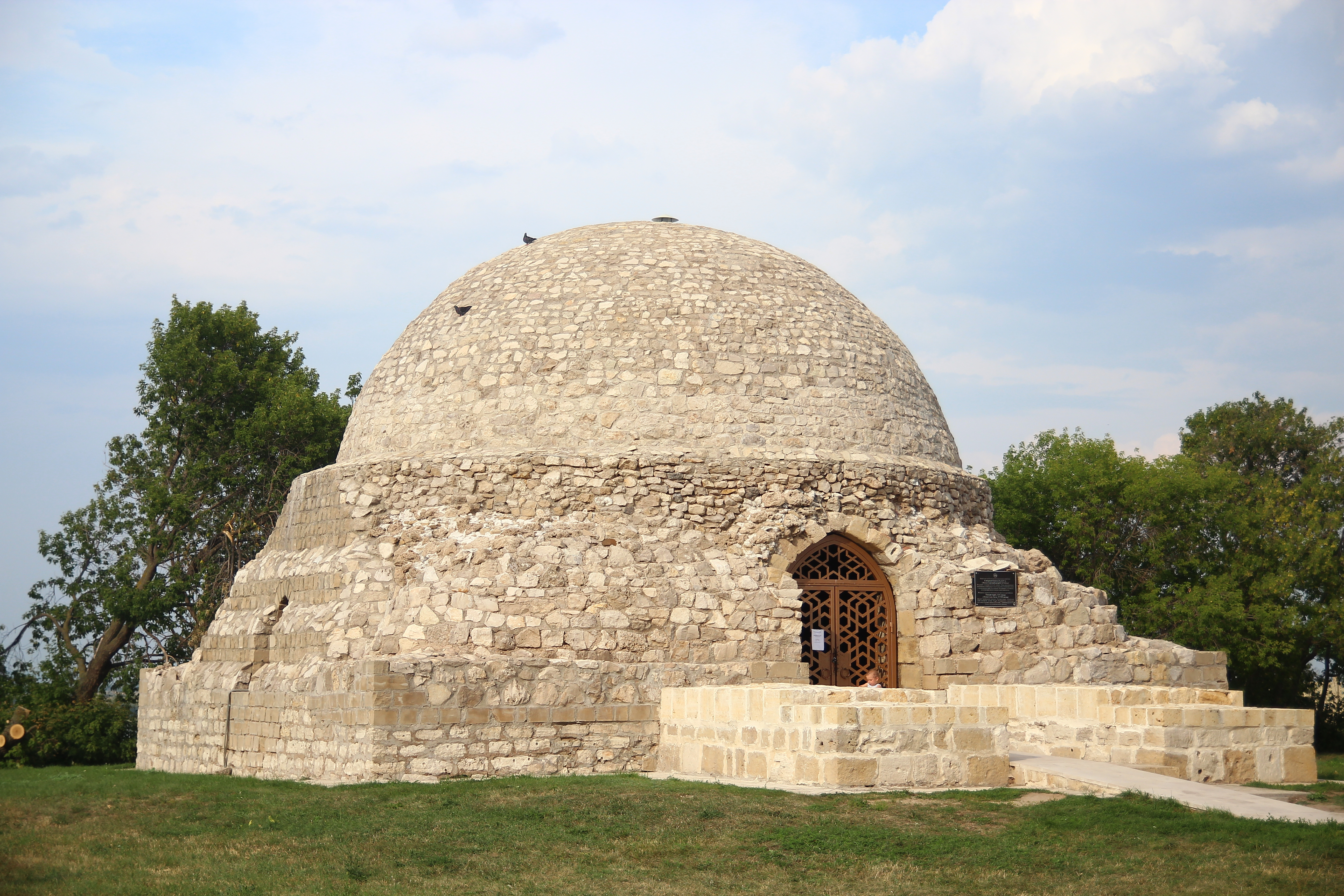 Комплекс памятников архитектуры XIII-XIV вв. на территории Булгарского городища (архитектурный комплекс «Болгары») (Республика Татарстан, Болгар, село Болгары, городище)